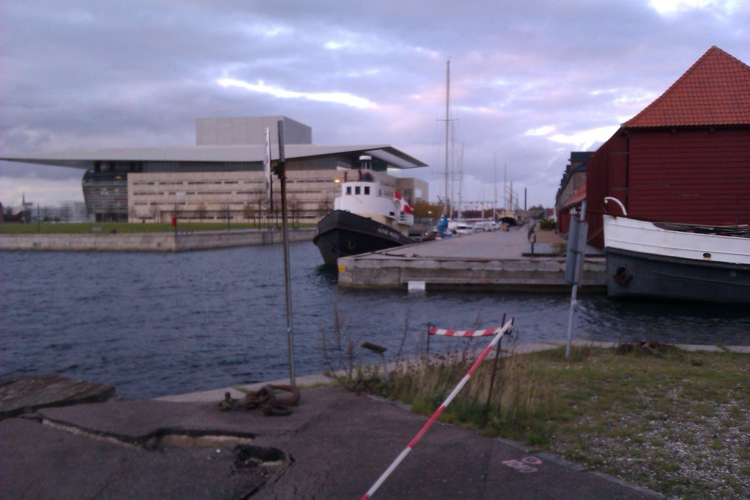 Her kommer Proviantbroen til at ligge